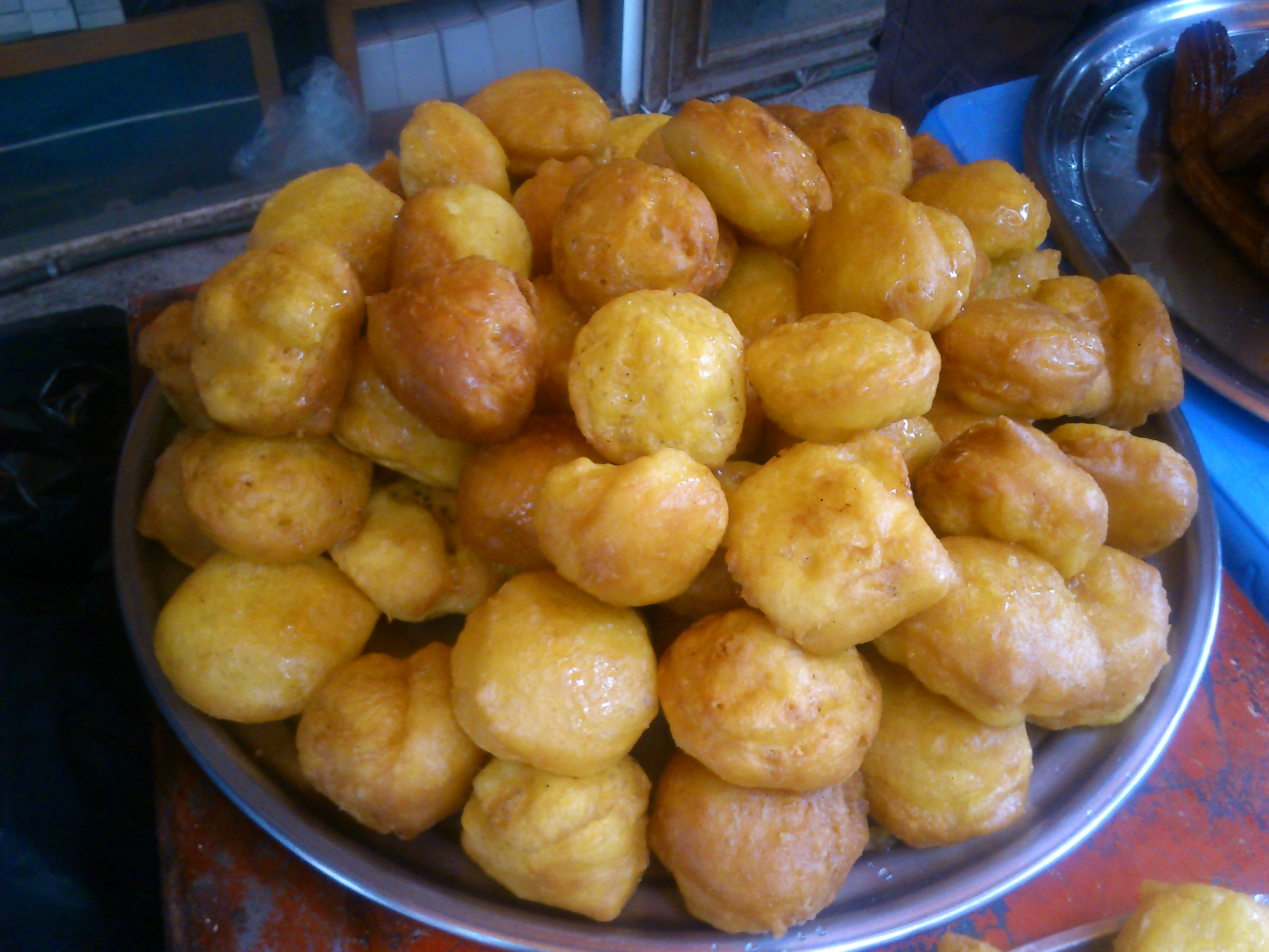 شیرینی بوکان - بامه زولبیا، یکی از سوغاتهای مشهور این شهر